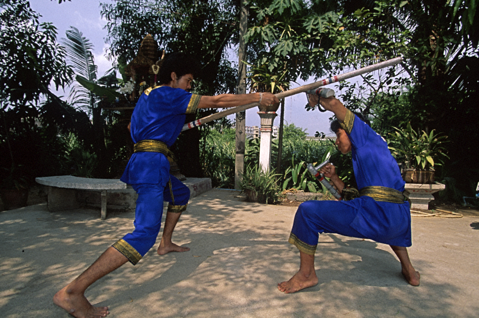 Krabi Krabong training with long pole and arm shields in Bangkok, Thailand